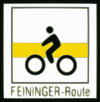 Piktogramm des Feininger Radweges.